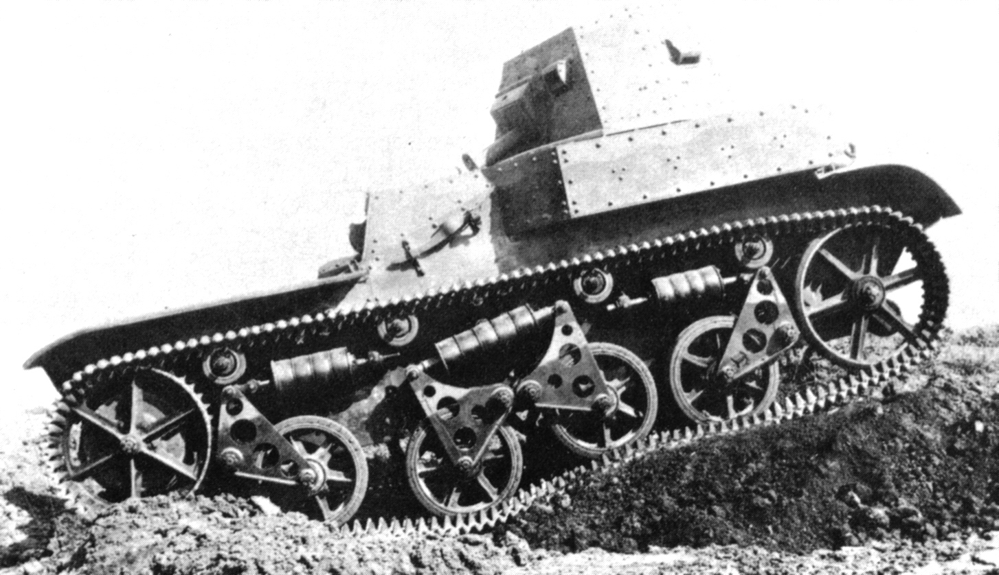 Digitale reproductie foto van prototype 79758 van de AMR 33